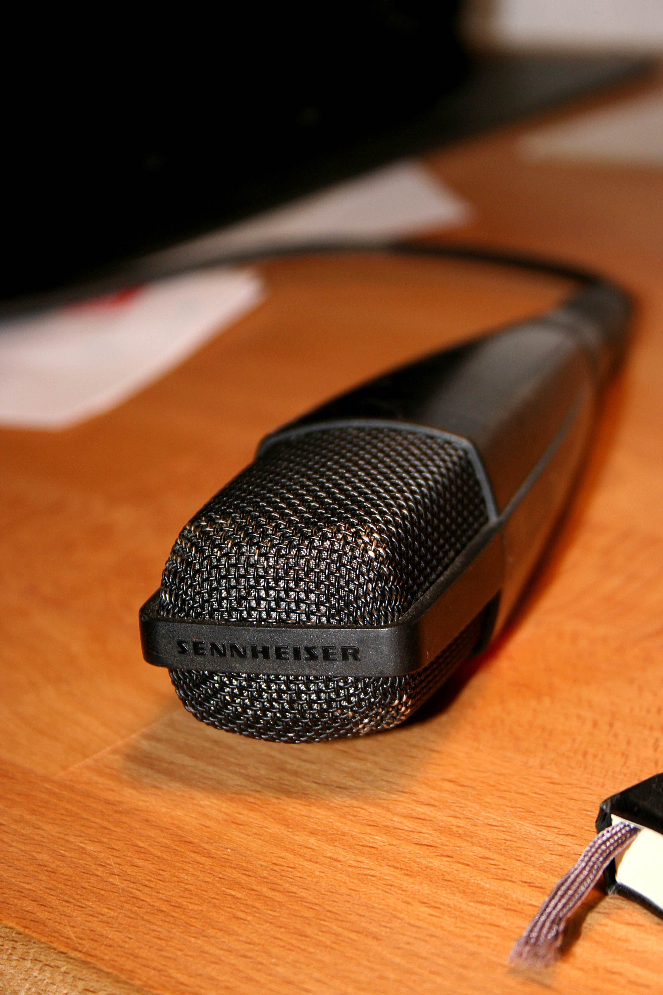 Sennheiser MD421 im Reportageeinsatz